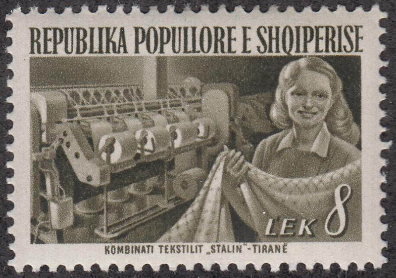 Pullë filatelike Kombinati Tekstileve Tiranë